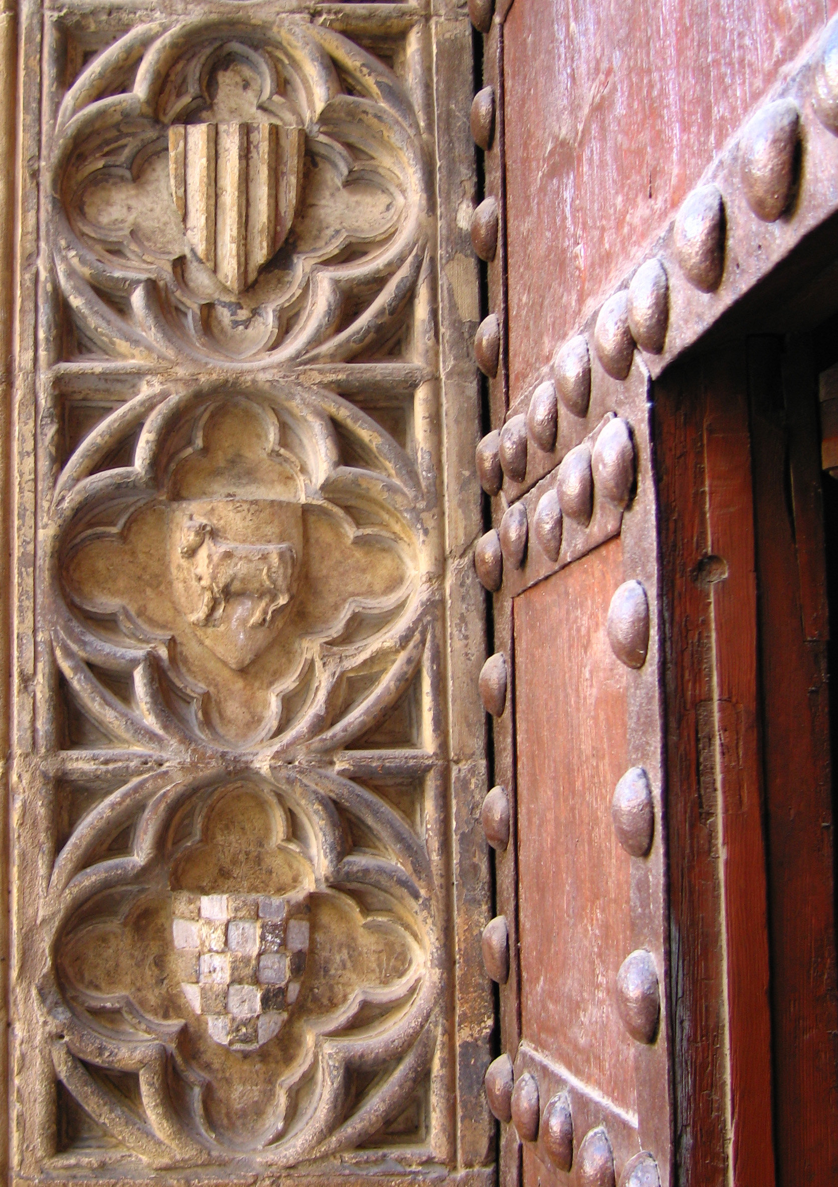 detall porta apostols seu valencia